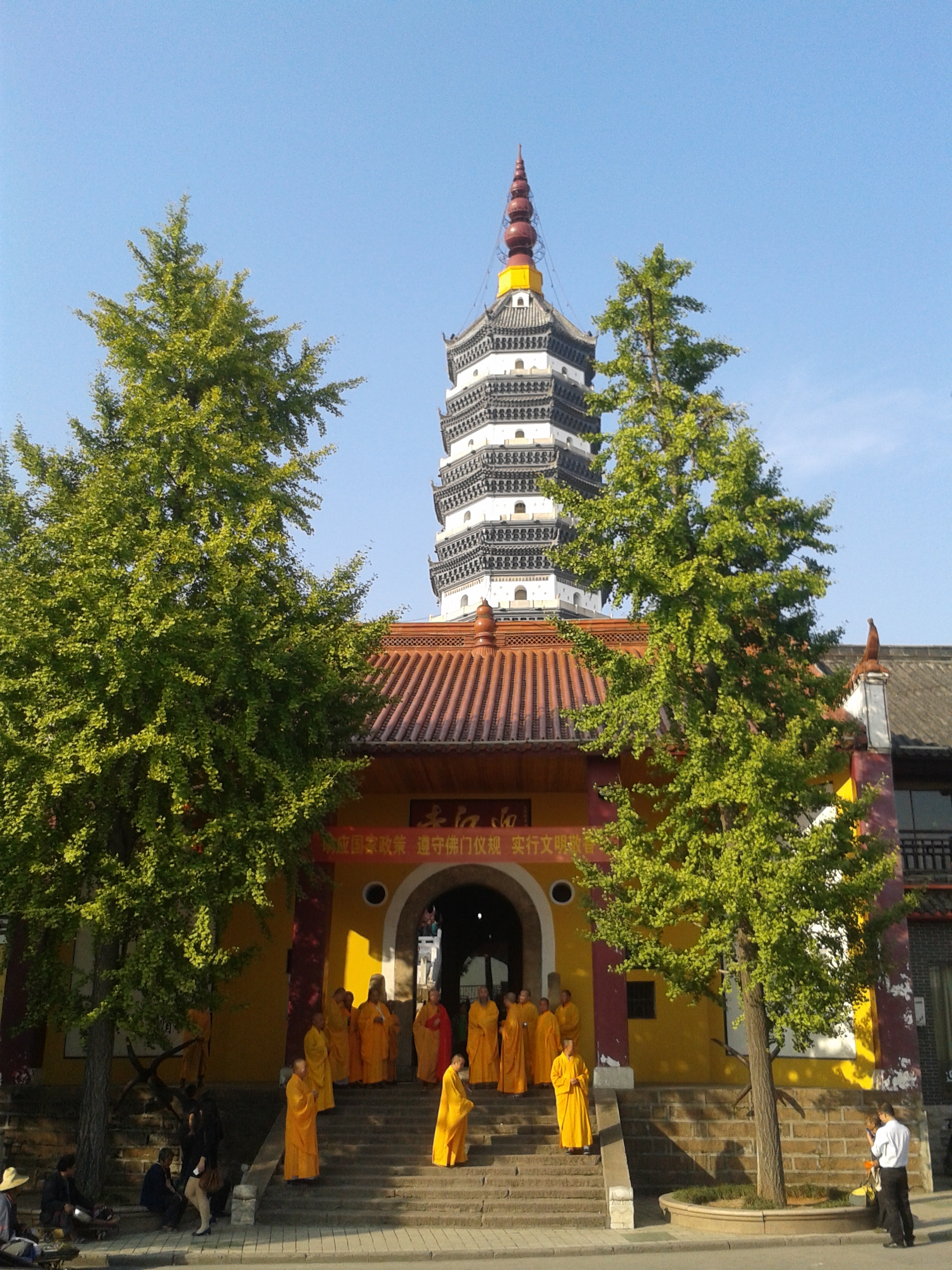 Entrée du monastère bouddhiste comprenant le temple Yingjiang et la tour pagode Zhenfeng. 12 Octobre 2015 : dans l'attente d'un vieux dignitaire.